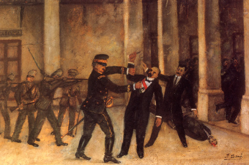 Francisco Ignacio Madero meggyilkolása (festmény, 1913)